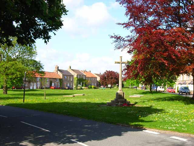 Village Green, Catterick Village